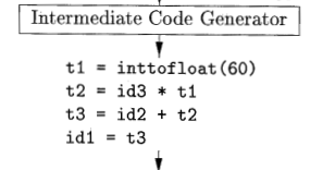 ֆգդֆհ